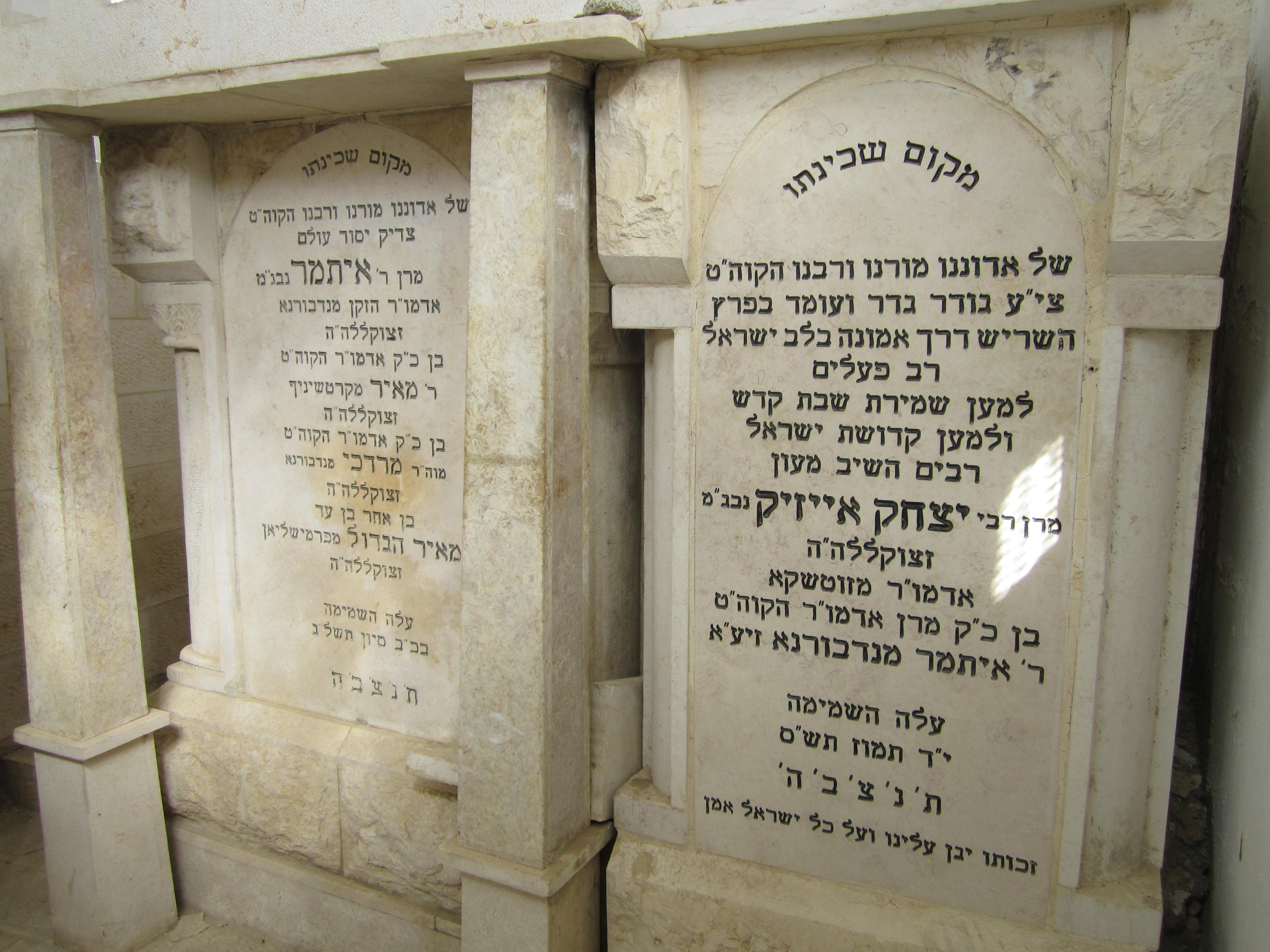 חלק מציונם של האדמורי"ם רבי איתמר ורבי יצחק אייזיק מנדבורנה בהר הזיתים